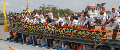 Mengulur Naga, salah satu prosesi dari Erau